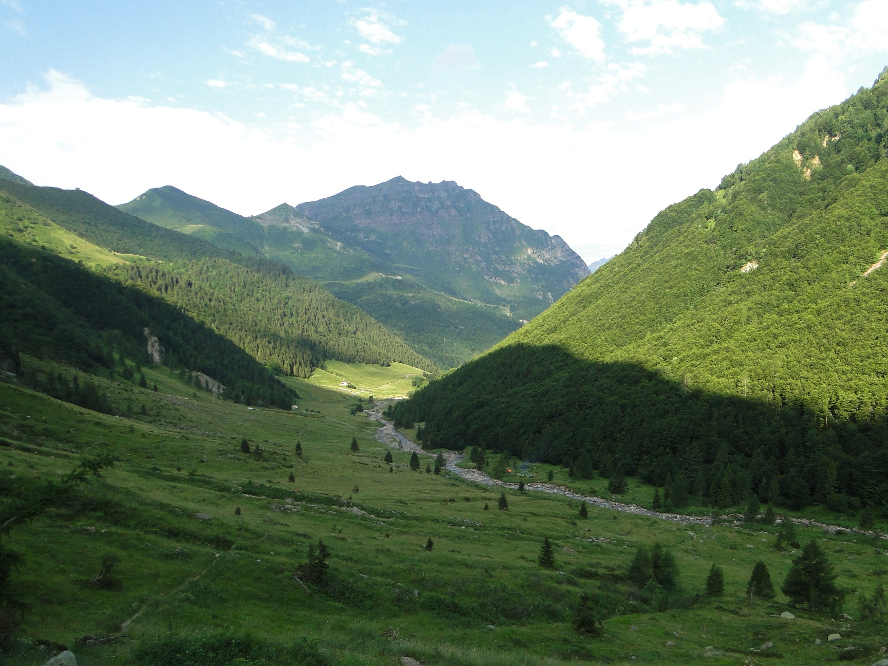 La valle Bondione nella piana di Lizzola